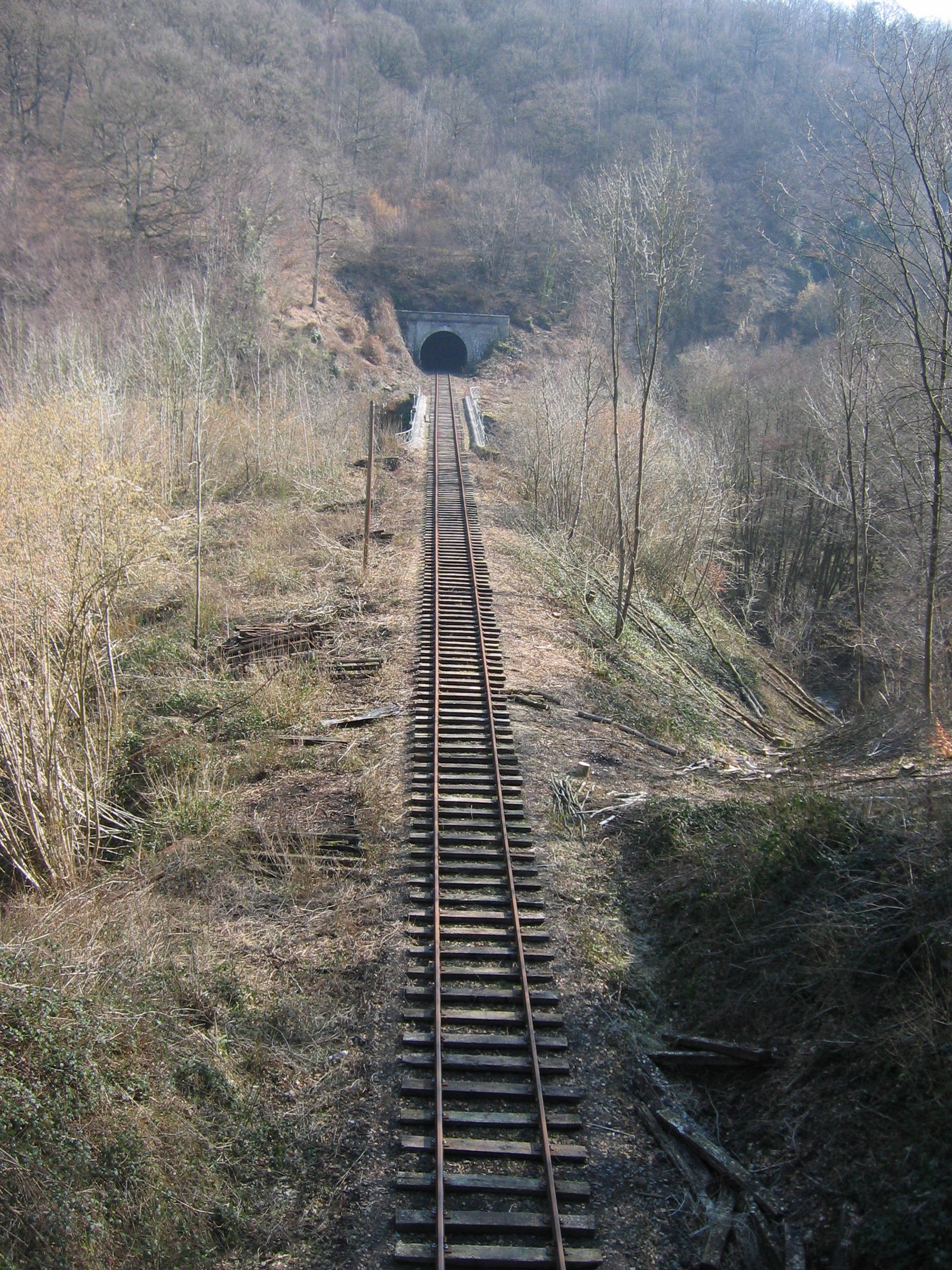 Spoorlijn 128 wordt heraangelegd (hier tussen Purnode en Dorinne-Durnal).